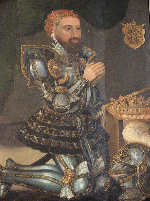 Christoffer I, maleri fra omkring 1575 i Ribe Domkirke, Jylland